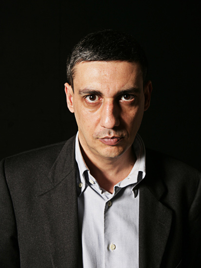 Lo scrittore Giuseppe Genna